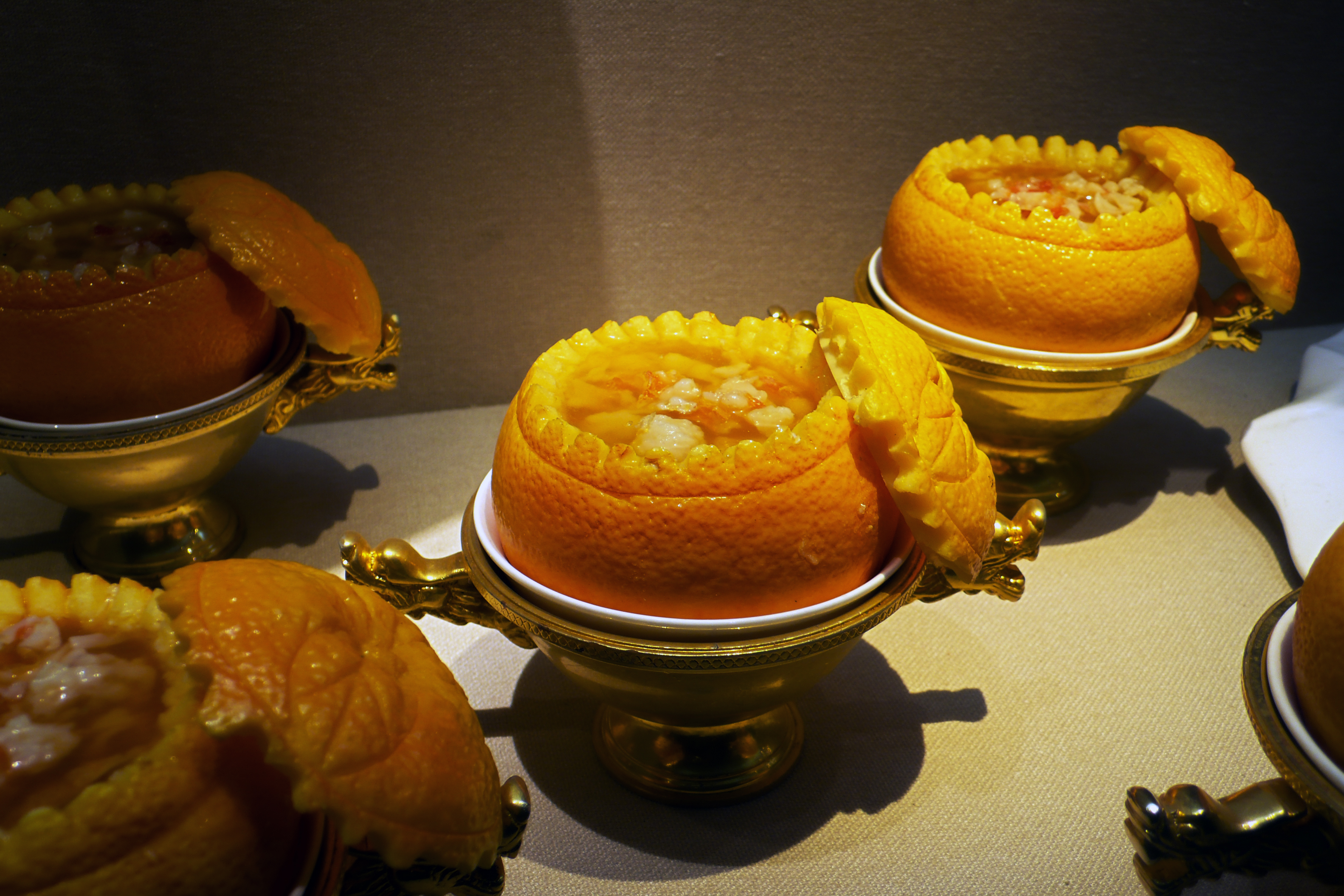 蟹酿橙，杭帮菜精品菜。